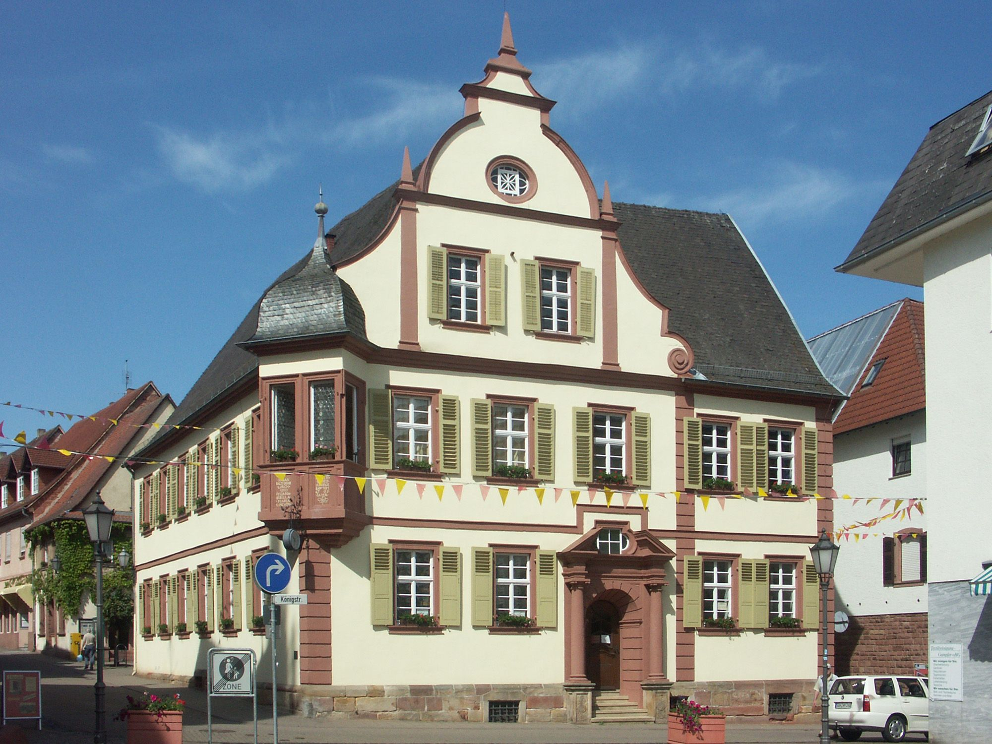 repräsentativer Barockbau von 1705; ehemals Haus Lorch, später Rathaus, heute Stadtbücherei von Bad Bergzabern